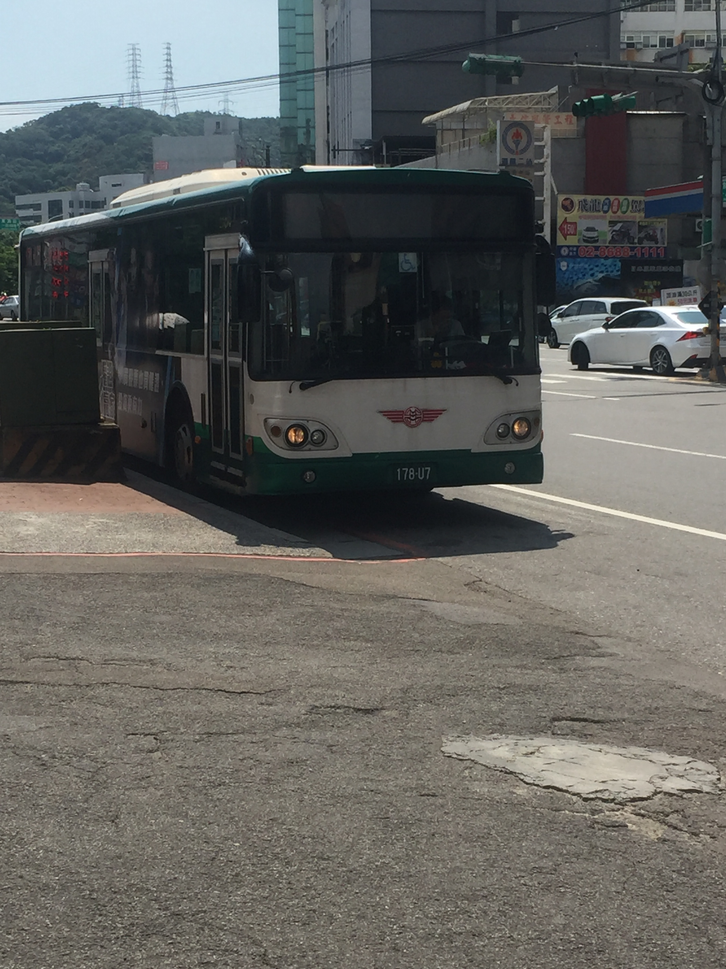 中文（台灣）: 2015 DAEWOO BS120CN 178-U7，於三重客運迴龍站附近